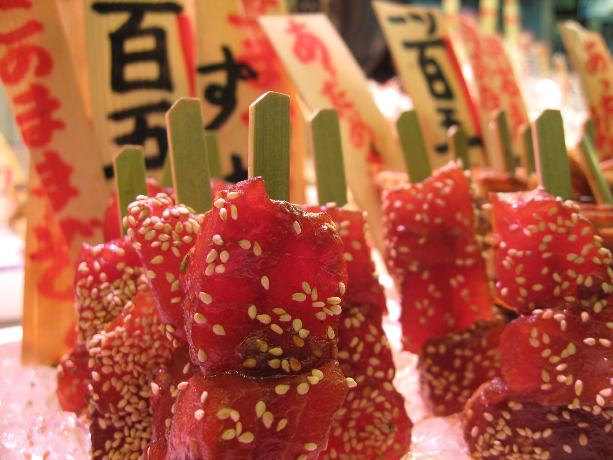 生マグロのヅケ串（京都市中京区錦小路通柳馬場西入ル中魚屋町483、錦市場の「錦 鮮魚 木村」[1]）